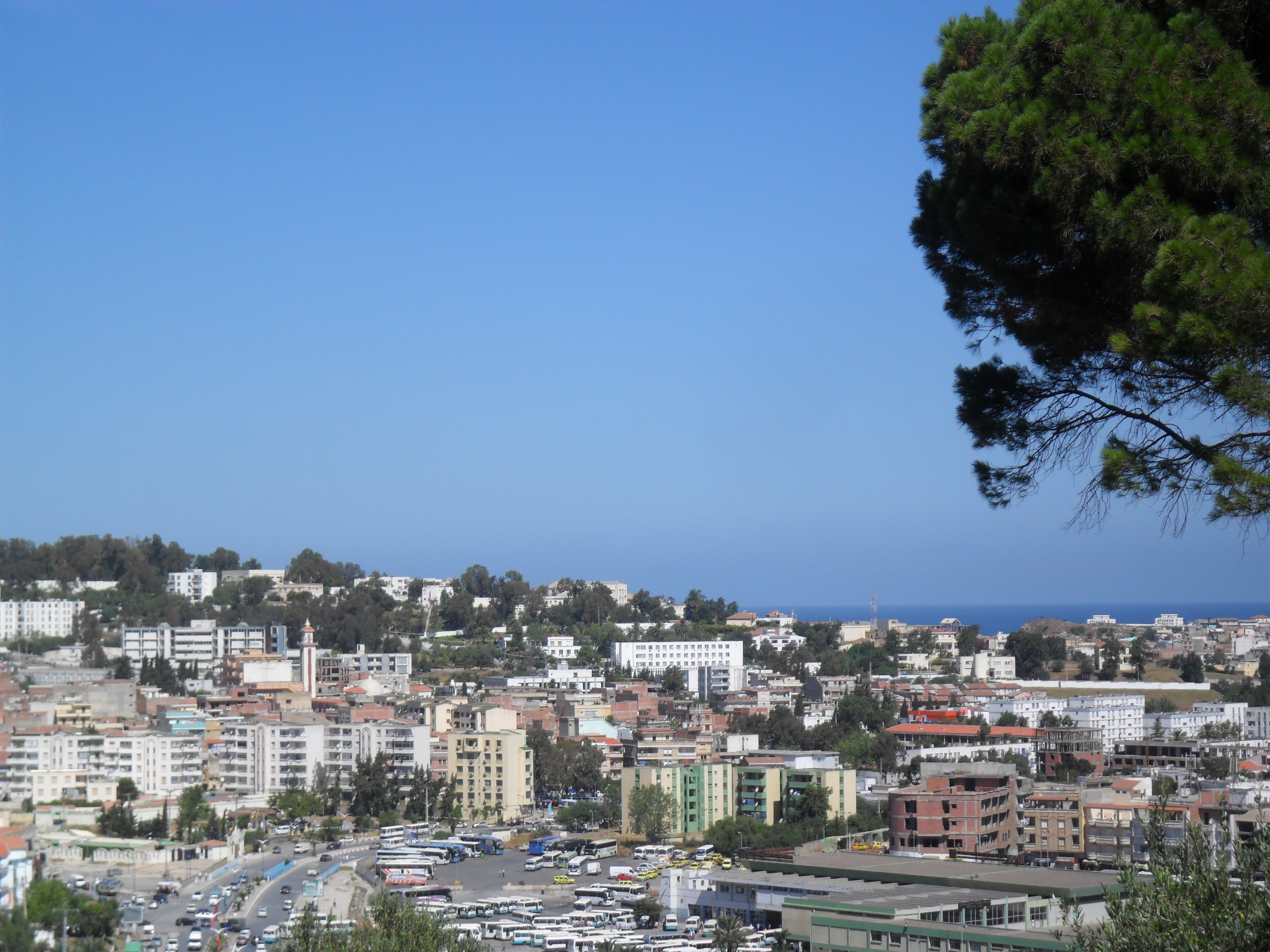 Jijel, Wilaya de Jijel (Algérie)